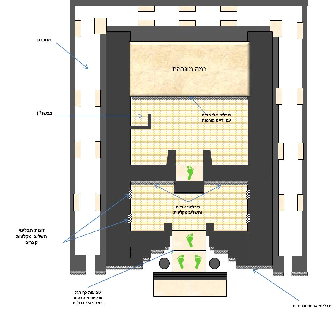 תרשים סכמטי של מקדש עין דארה בסוריה, על בסיס שרטוטי החופרים וחוקרים אחרים